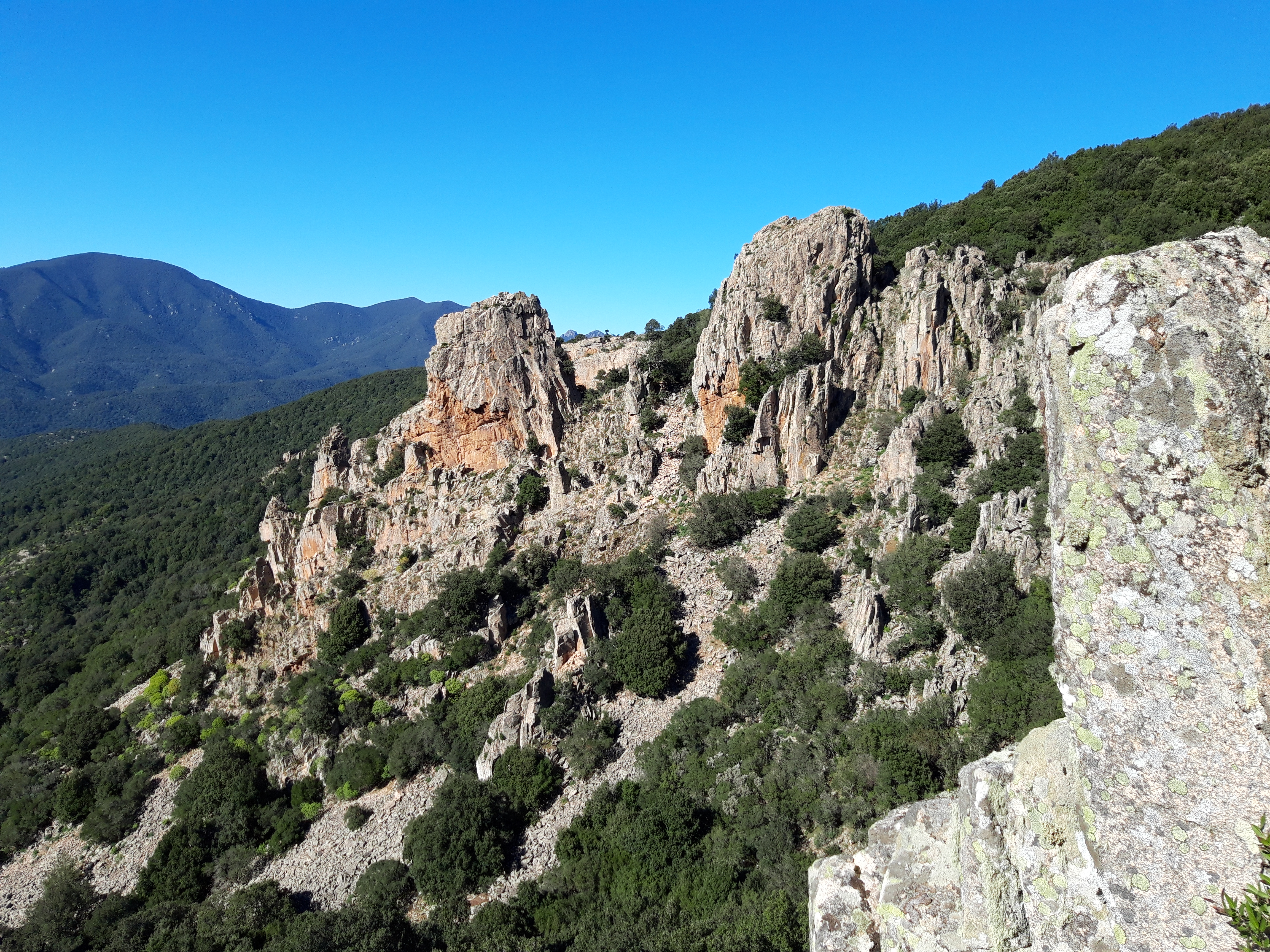 Monti di Santadi, zona Pranedda